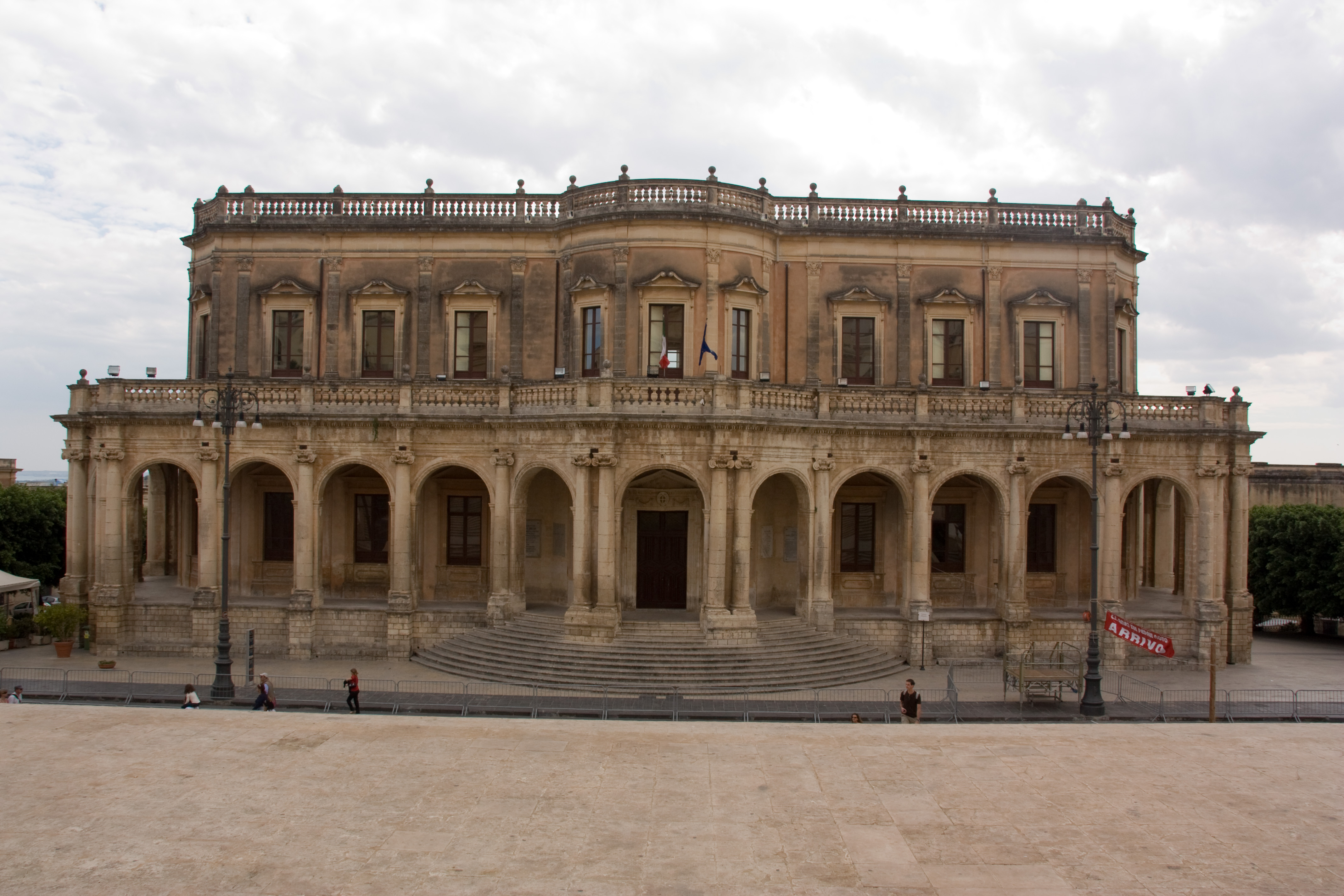 Palazzo Ducezio, Noto, Sicile, Italie.